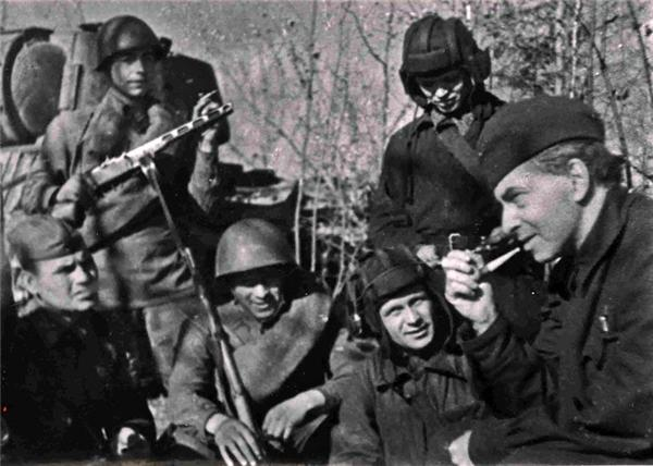 Эренбург в гостях у танкистов, 1942 год